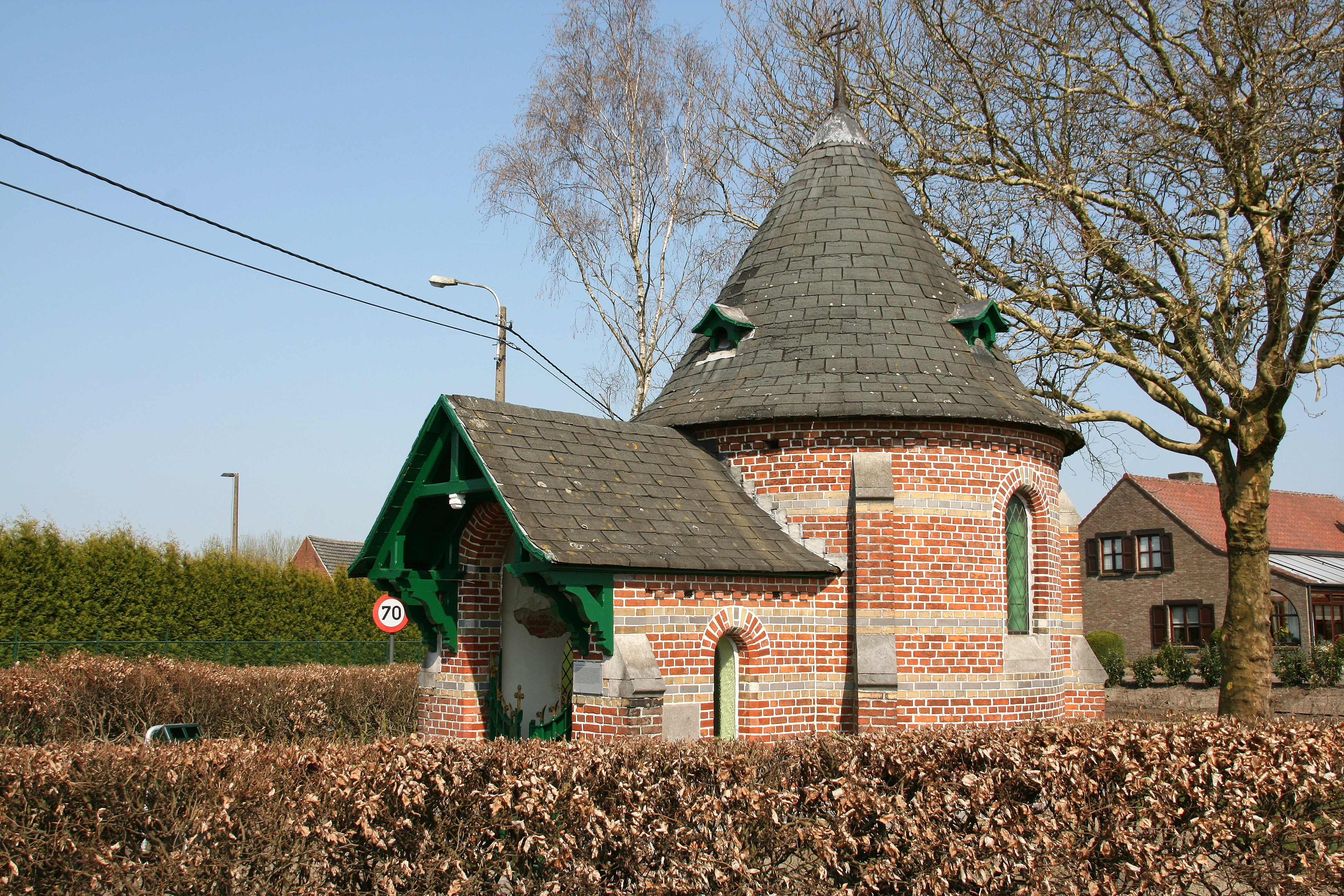 Er staat een kapelletje in "De Hegge", een buurtschap in het grensgebied tussen de gemeenten Poppel en Weelde. De kapel is toegewijd aan de H. Poppelius wiens beeltenis er op de ereplaats prijkt. Met deze Poppelius is echter iets aan de hand: Poppel en Weelde eisen ieder voor zich de eer op de geboorteplaats van deze martelaar van Gorcum te mogen zijn.